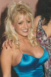 Sandi Beach